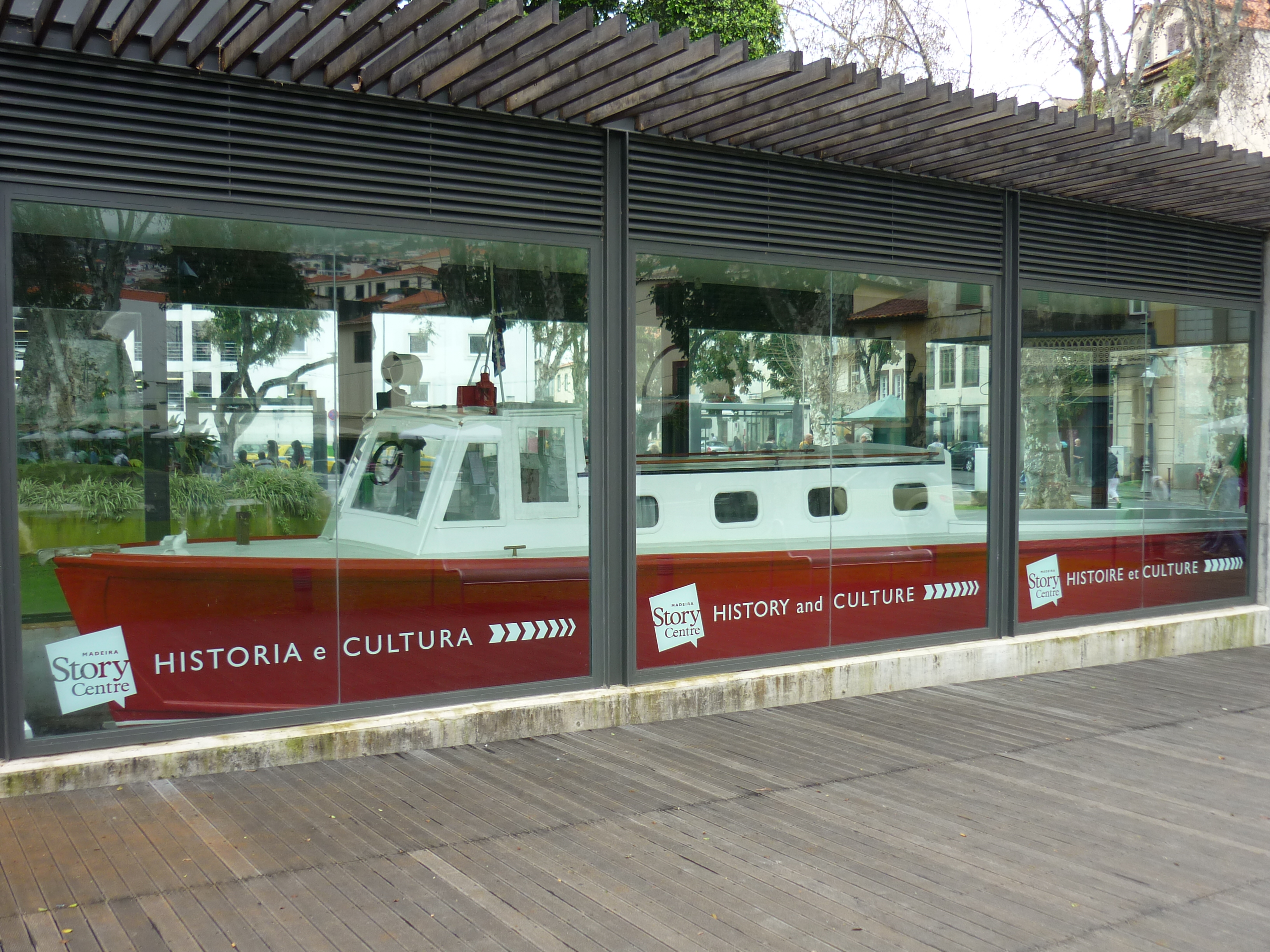 A Sas (Aquila) Funchalban (Madeira)